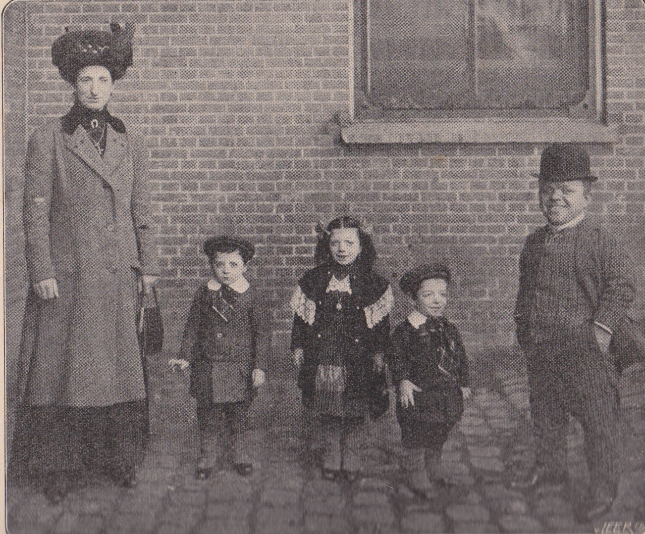 Wie monsieur Manie, meer bekend als Kleine Jacob, 't lichamelijk zoo benedenmatige potsenmakertje bij Carré in actie ziet, zal bezwaarlijk vermoeden, dat dit oolijke baasje er vrouw en kinderen op na houdt. Toch is het zoo. Op onze foto compareert het echtpaar met kroost. Mevt. Manie, evenals haar gemaaltje, uit Belgie geboortig, verhuigt zich in een normale lengte en de naast haar staande kleine René (4 jaar) en 't meisje, Aline (6 jaar) dreigen die mettertijd óók te zullen krijgen. Maar Marcel, de kleinste van de drie, is al 8 jaar. Dit leuke hukkepukkie belooft dus op 't stuk van "grootte", 'n waardig zoon van z'n papa en, evenals deze, door zijn kleinheid groot te worden. - In een onderhoud met Monsieur Manie vernamen wij, dat hij 38 jaar geleden te Charleroi werd geboren, daar op 16-jarigen leeftijd zijn circus-loopbaan begon, eenmaal op een fete Flamande met Prins Boudewijn ' n glas champagne dronk en in de meeste groote steden van Europa is opgetreden. In 't gewone leven blijkt hij levenslustig, vroolijk, maar bovenal bescheiden te zijn. Hij houdt zich niet grooter dan hij is, schuwt alle grootdoenerij en minder dan tal van kunstenaars, wier populariteit bij die van "Kleine Jacob" hopeloos in 't niet zinkt, loopt hij gevaar aan grootheidswaanzin te zullen gaan laboreeren